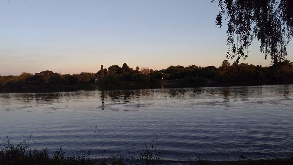 Rìo Gualeguaychú Gualeguaychú. Entre Ríos, Argentina.